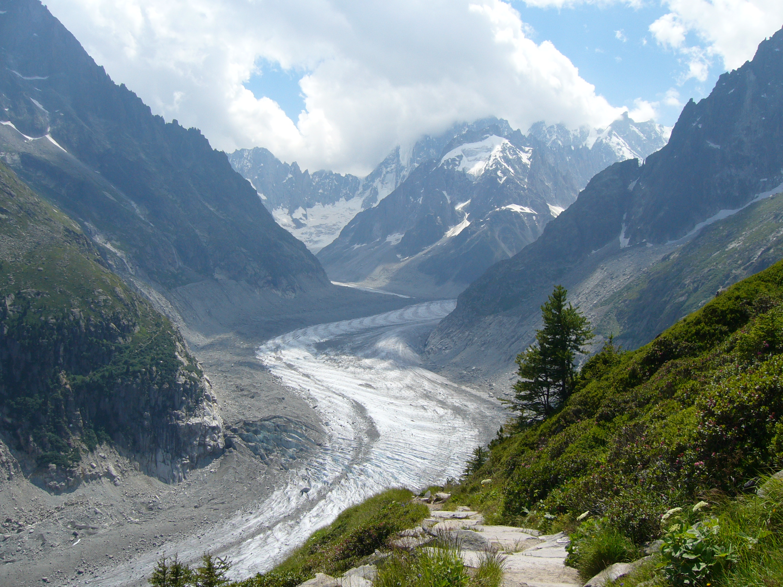 La mer de glace